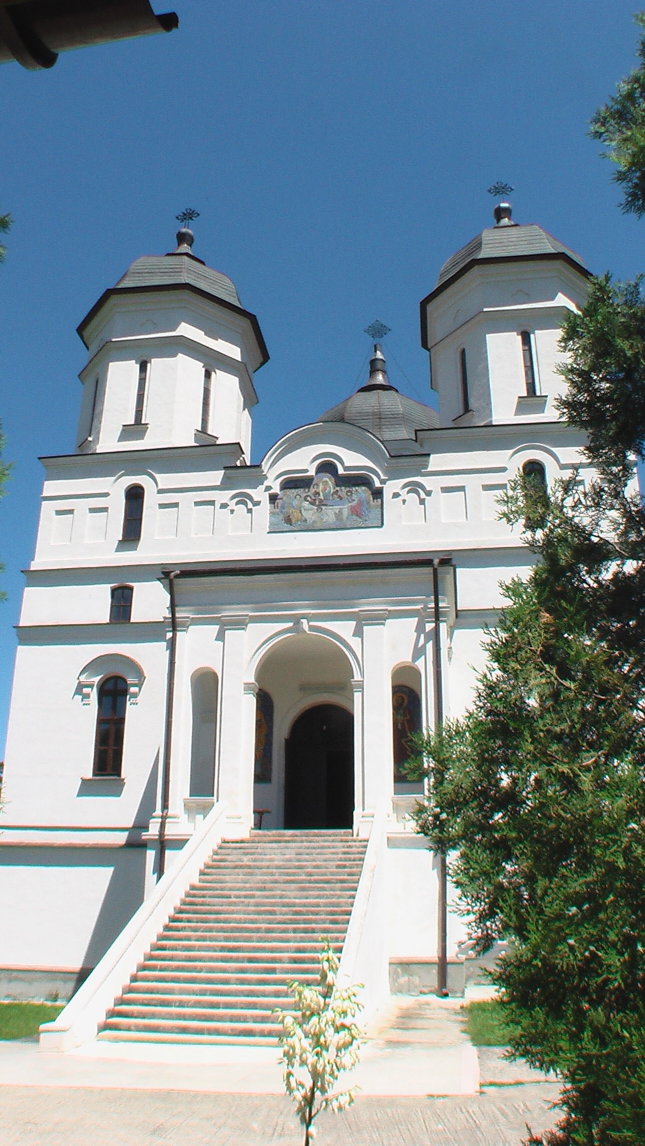 KlosterCelicDere1